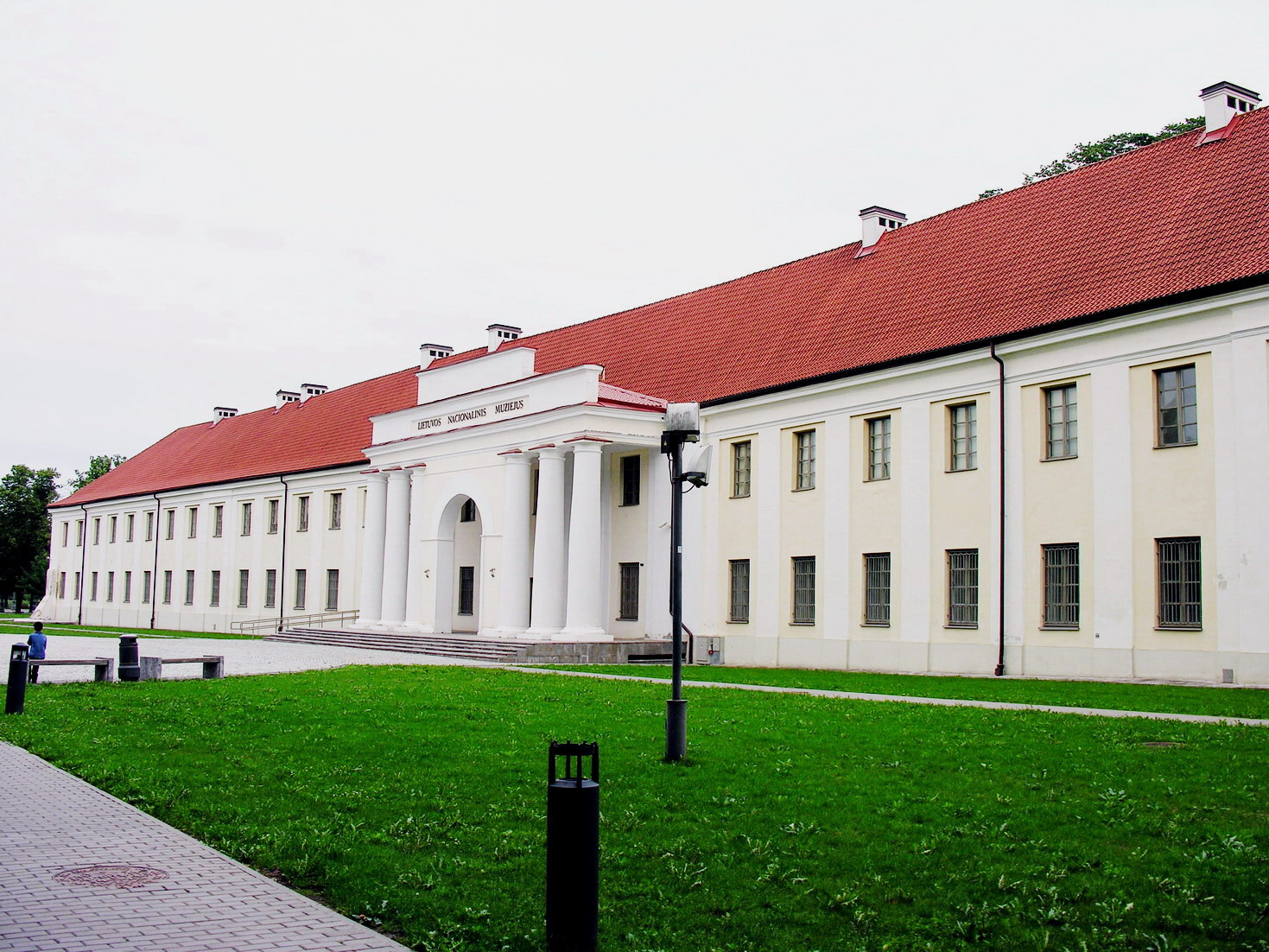 Naujasis arsenalas, šiuo metu įsikūręs Lietuvos dailės muziejus. New Arsenal in Vilnius Castle Complex, currently Lithuanian Art Museum.